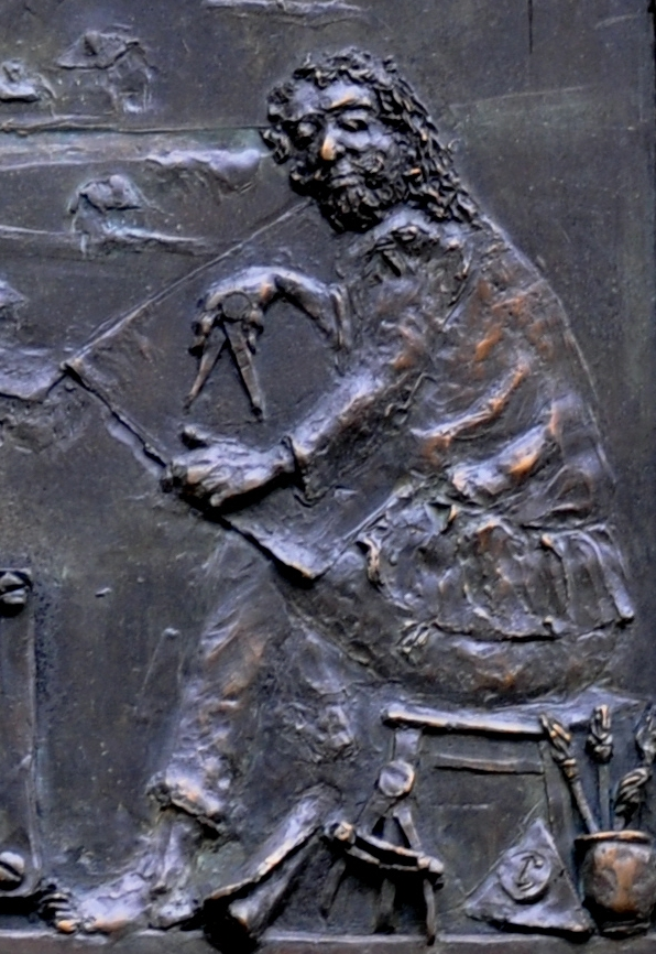 Wangen, Bindstraße 11, Gedenktafel für Johann Andreas Rauch, Detail: Johann Andreas Rauch